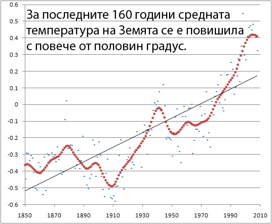 Изменение на средната температура на Земята за последните 160 години (1850 - 2009)